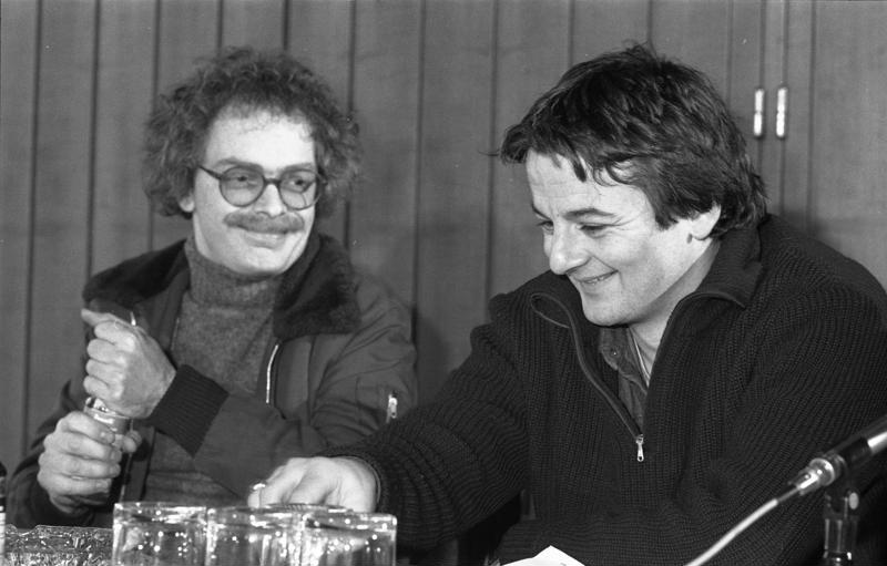 17.2.1983 Pressekonferenz der "Grünen" im Restaurant Tulpenfeld (zur Bundestagswahl am 6.3.1983)